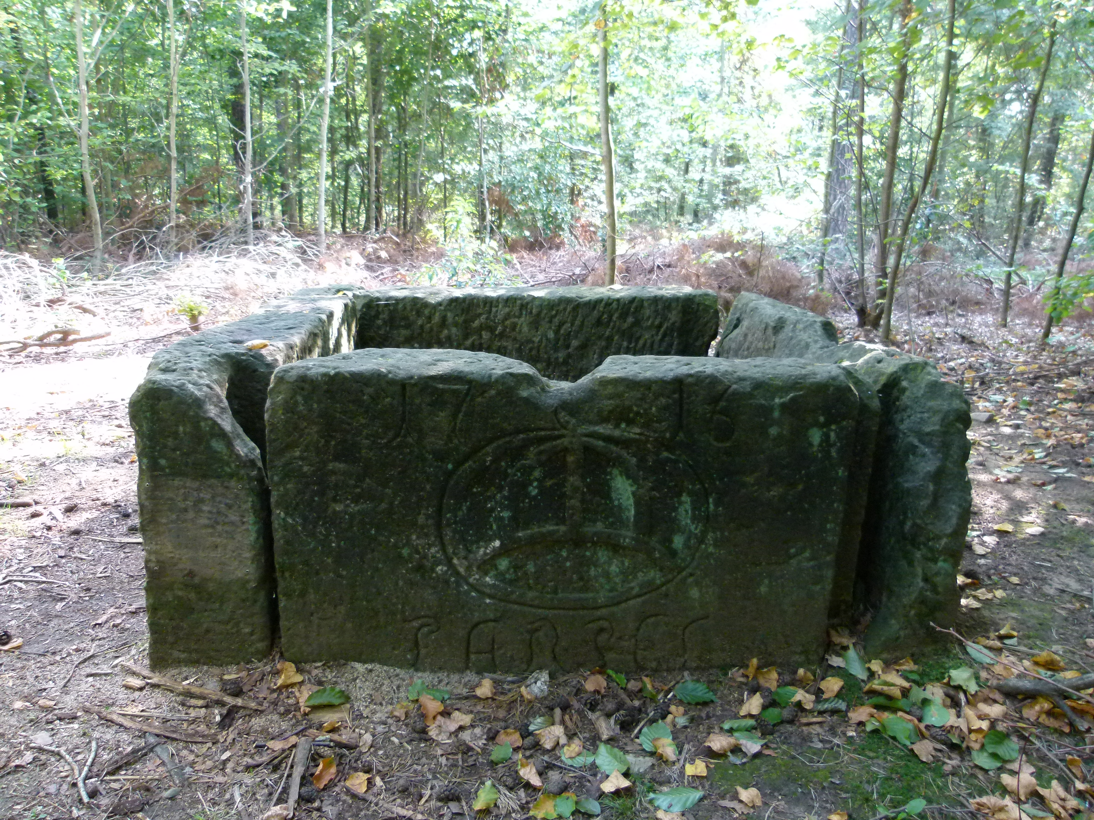 Denkmalgeschützte Salzlecke (1716) im Wald von Grossgraupa, Pirna, Sachsen